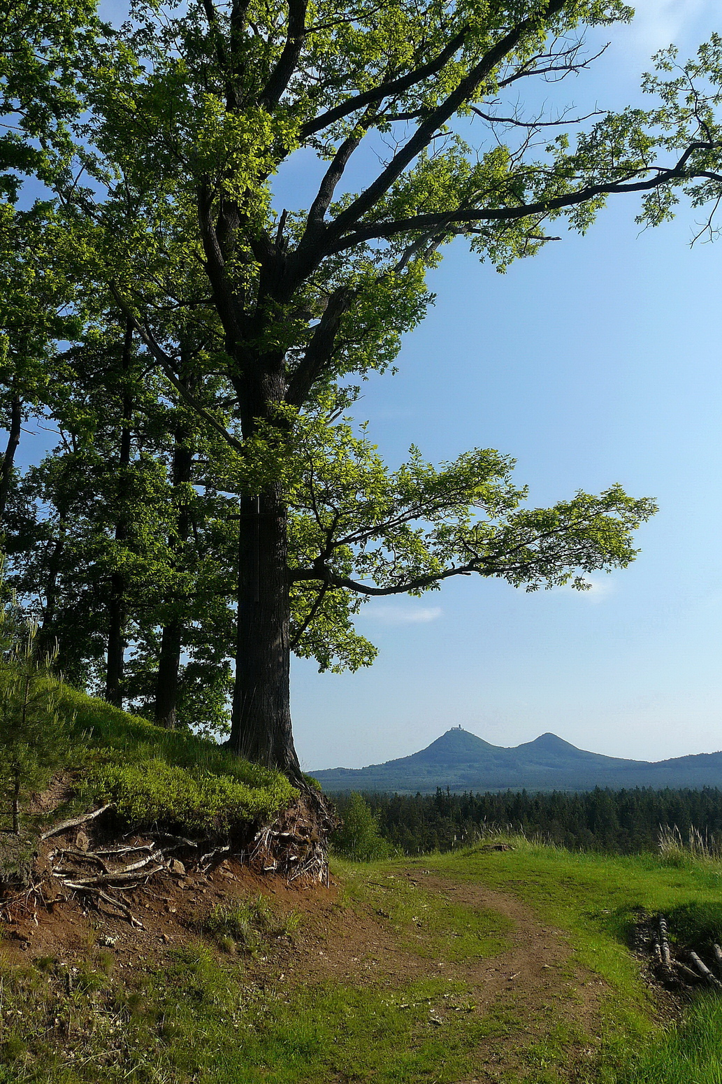 Bezdězy z Dubového vrchu